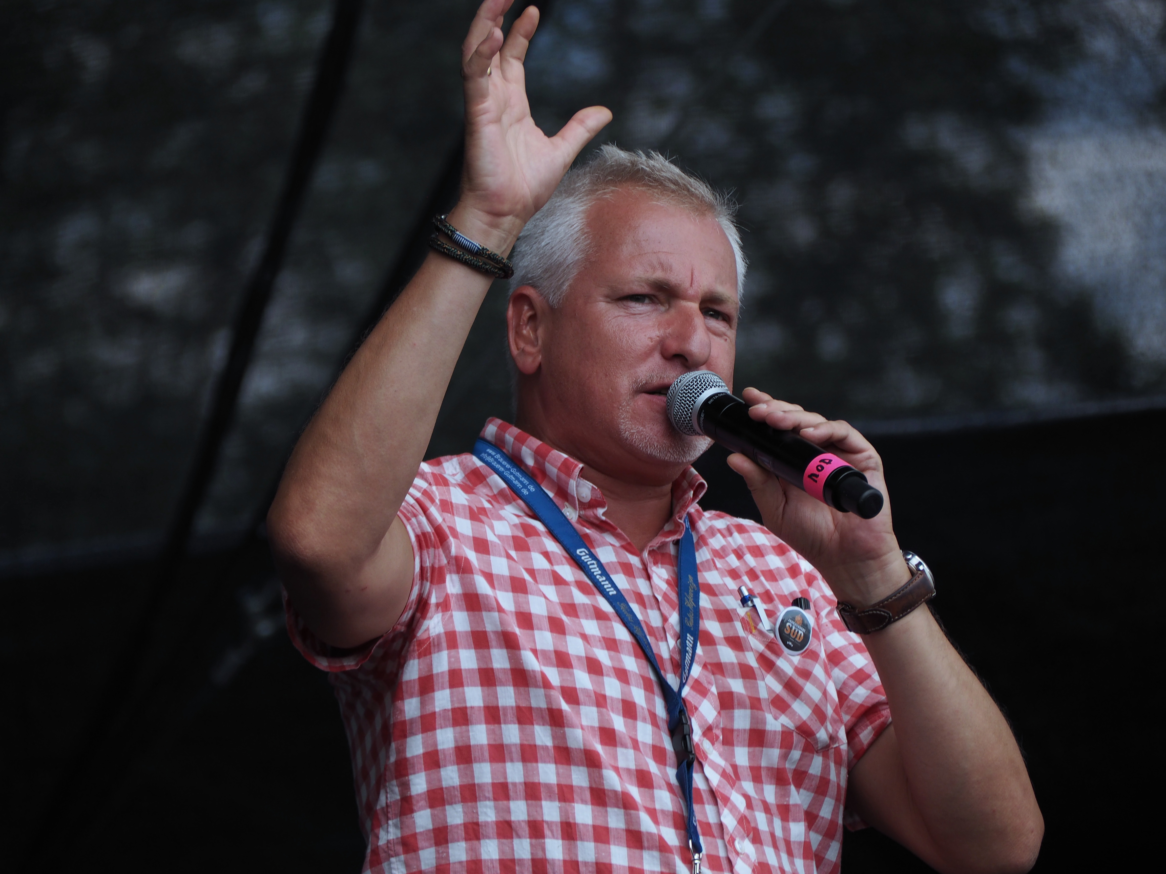 Matthias Mattuschick auf dem Jahrhundertsud Festival 2016 in Steinsdorf, Gemeinde Altmanstein